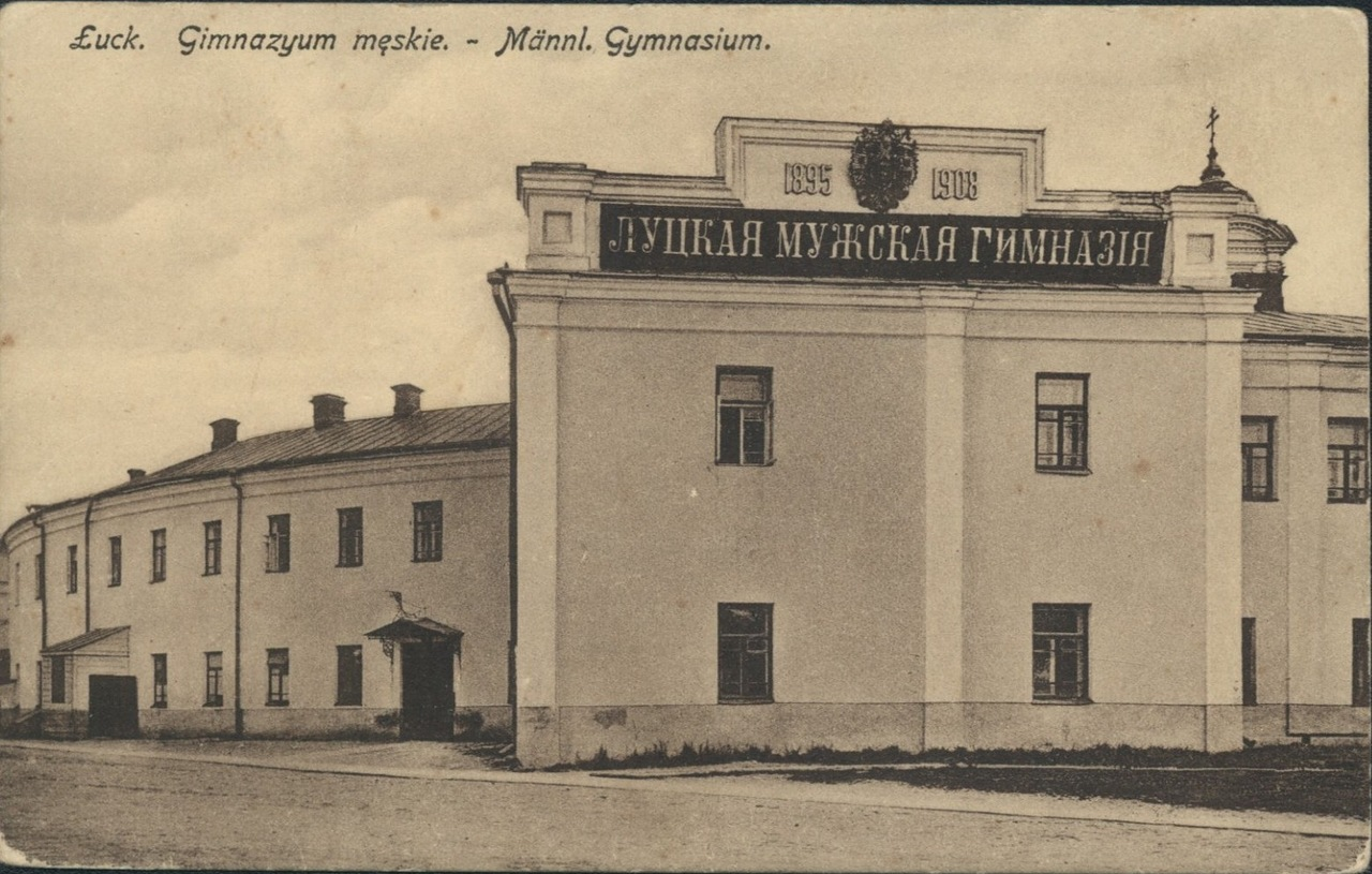 Чоловіча гімназія у Луцьку в 1916 р.